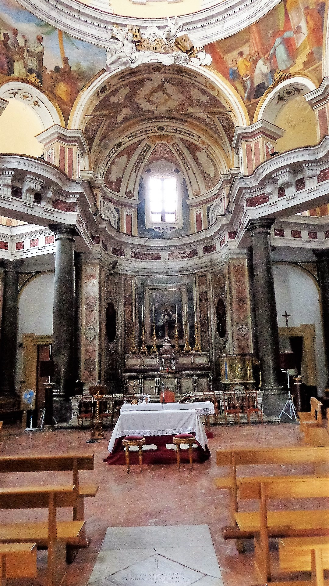 Altare maggiore.